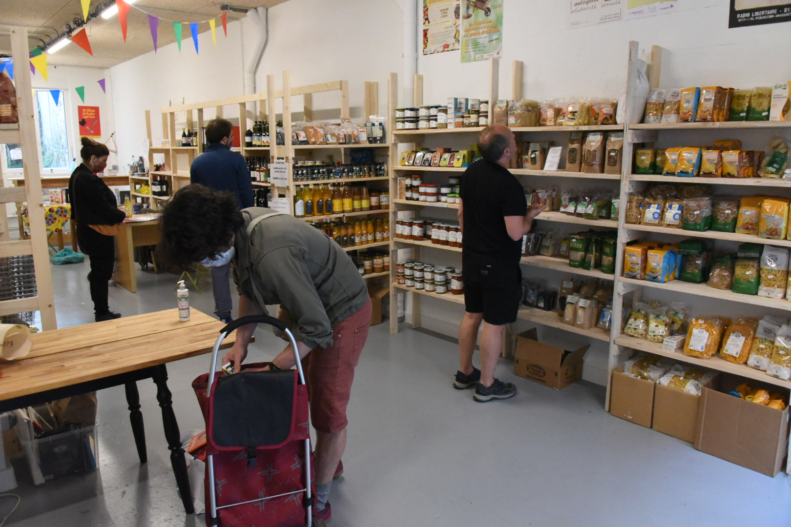 Epicerie coopérative et autogérée, ici la Dionycoop de Saint-Denis (France)